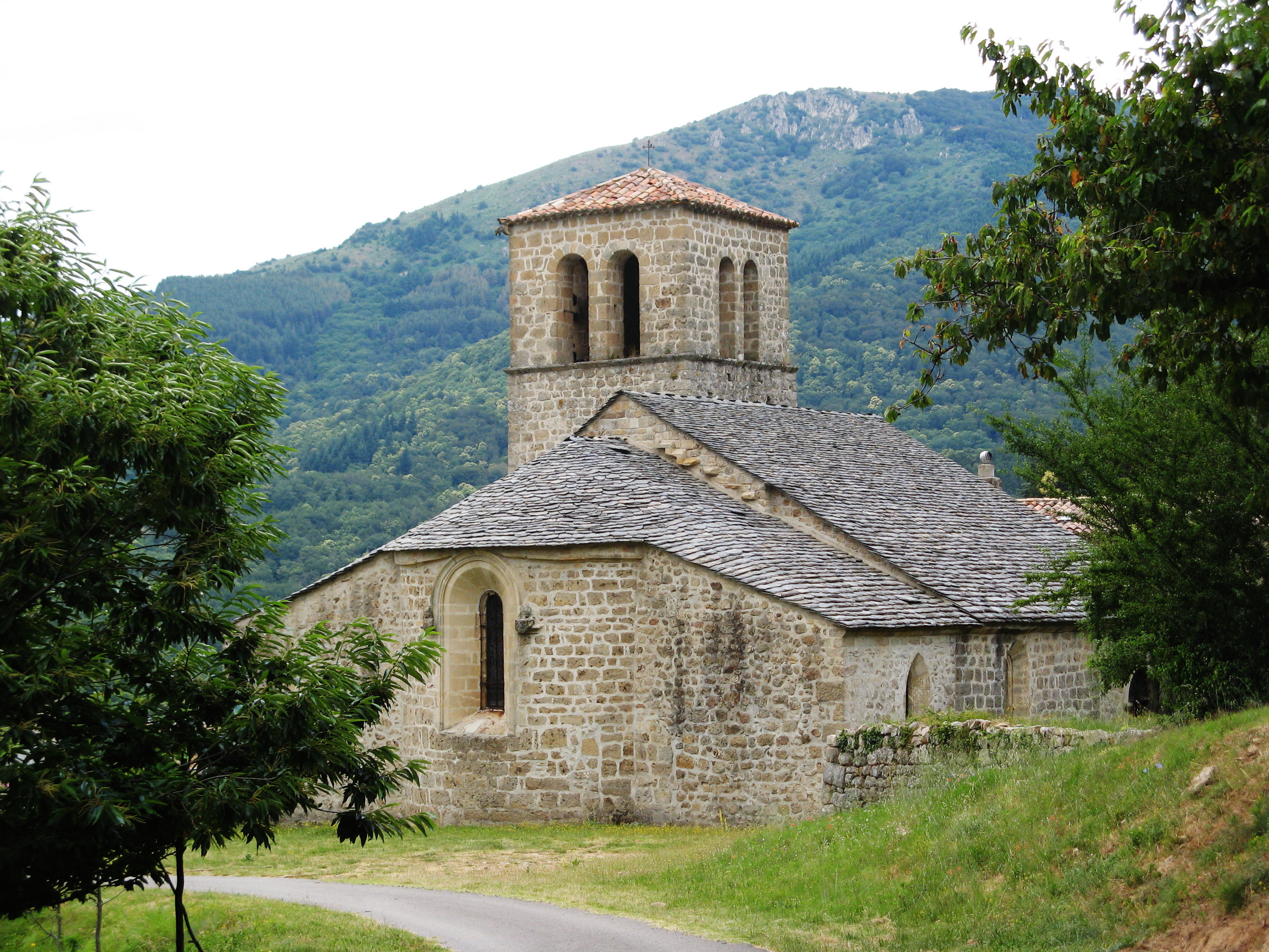 Prunet : église Saint-Grégoire .